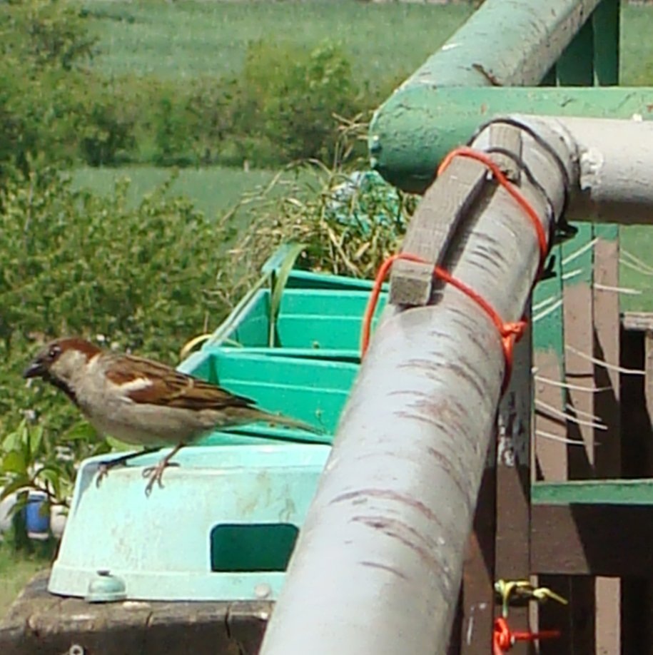 Wróbel domowy (Passer domesticus) przy pojniku